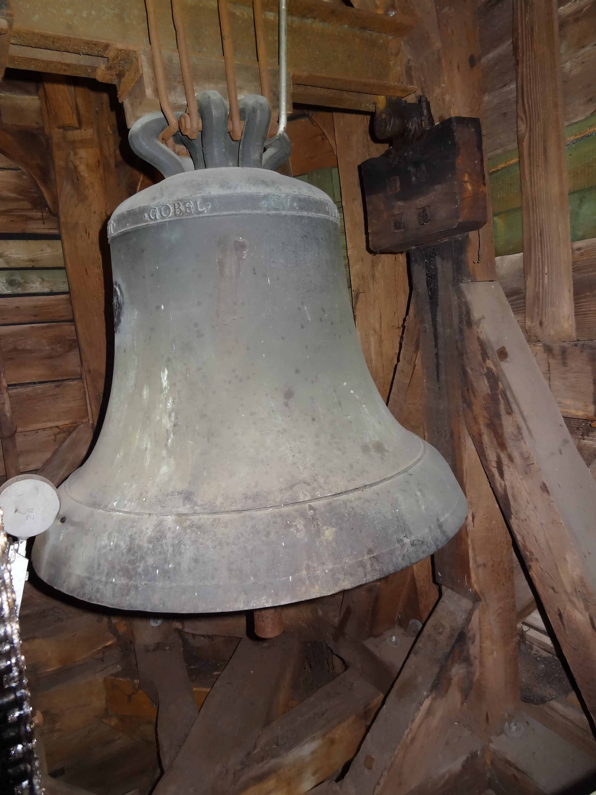 Evangelische Pfarrkirche Reiskirchen